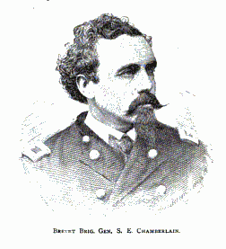 Brevet Brigadier General Samuel E. Chamberlain